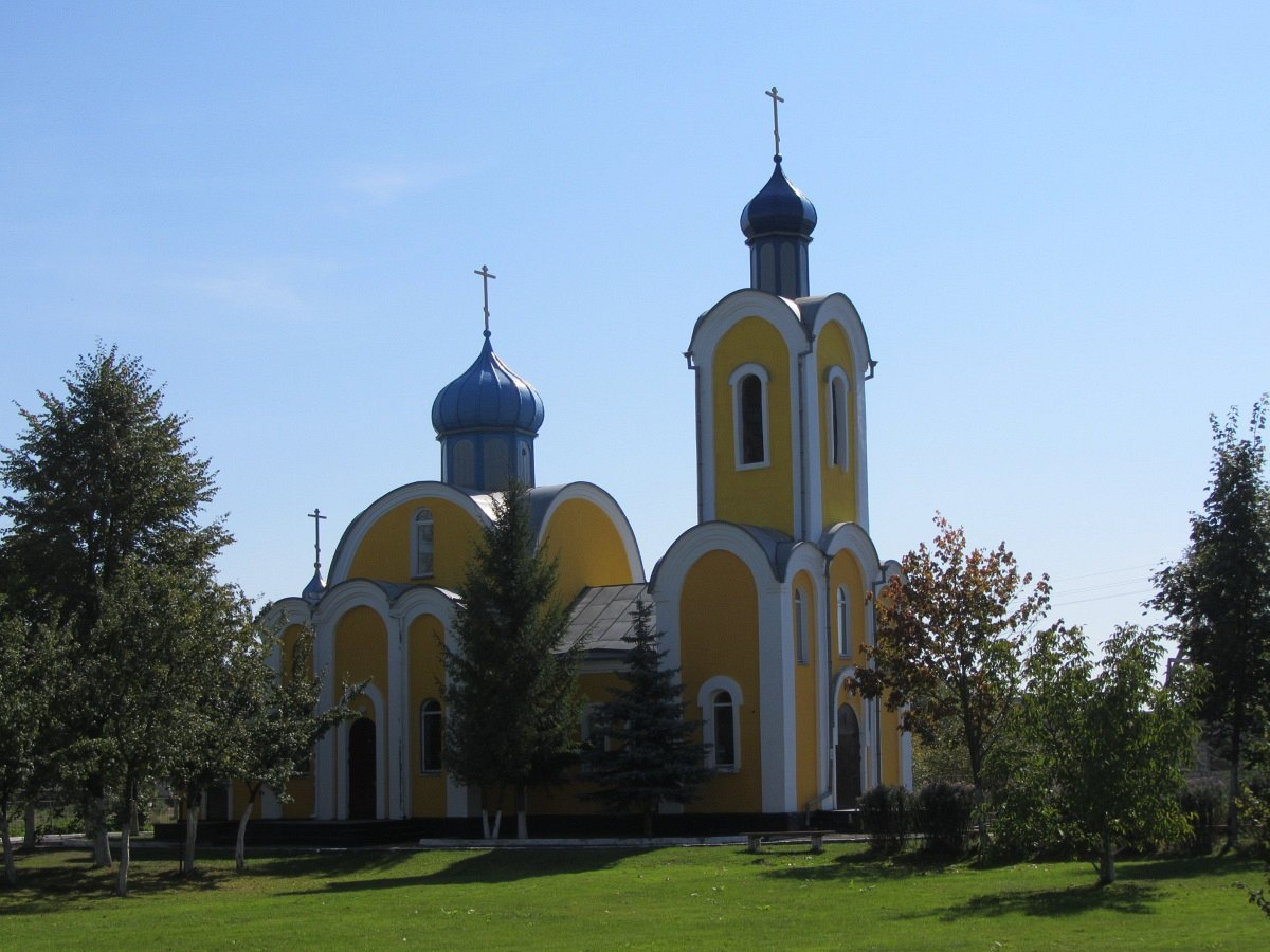 Буда-Кашалёва. Царква